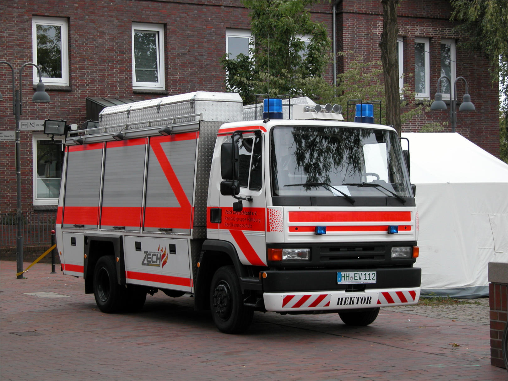 Rettungswagen von Falck Deutschland in Pinneberg